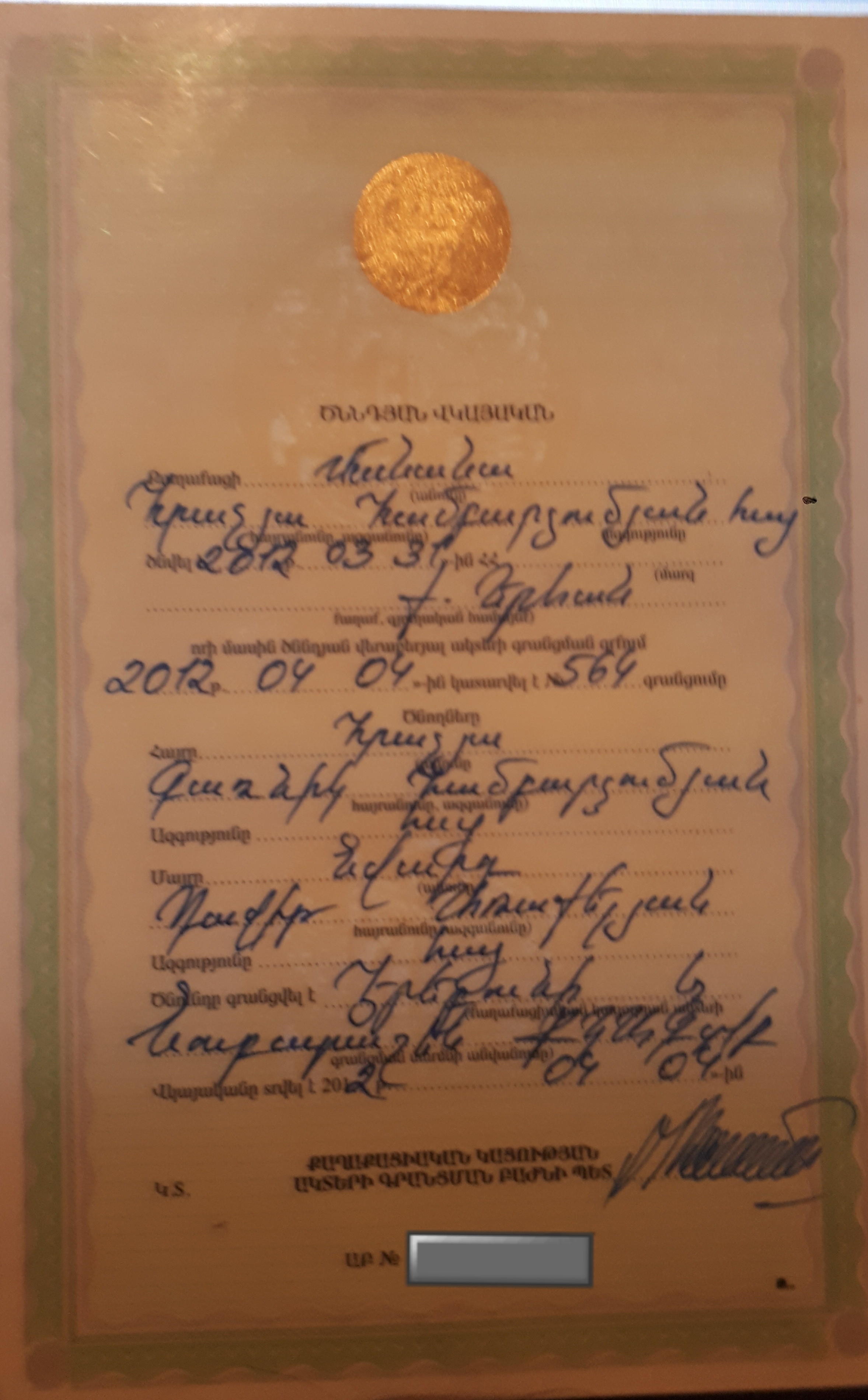 Հայկական ծննդյան վկայական